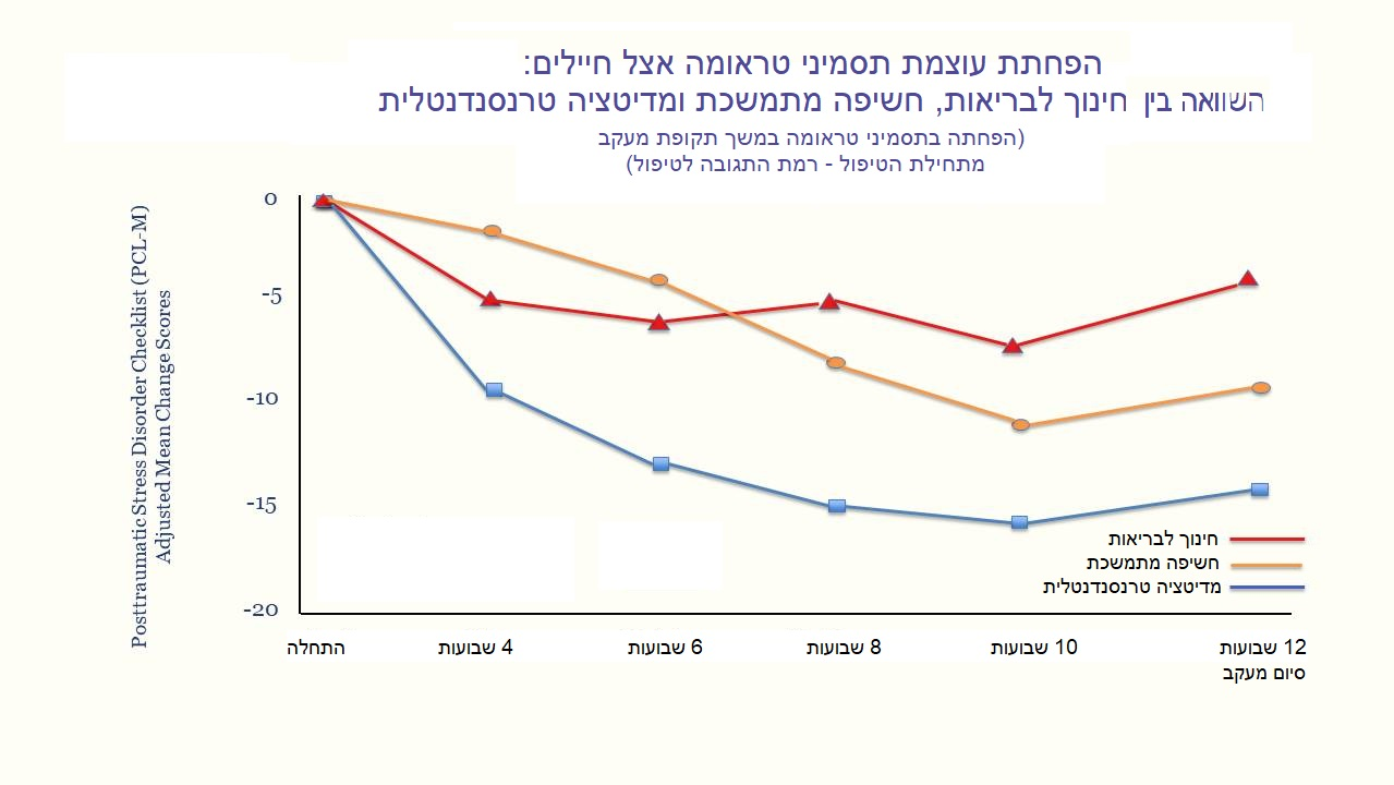 השוואה בין השיטות המקובלות כיום לטיפול בתסמיני מתח פוןסט טראומטי למדיטציה הטרנסנדנטלית